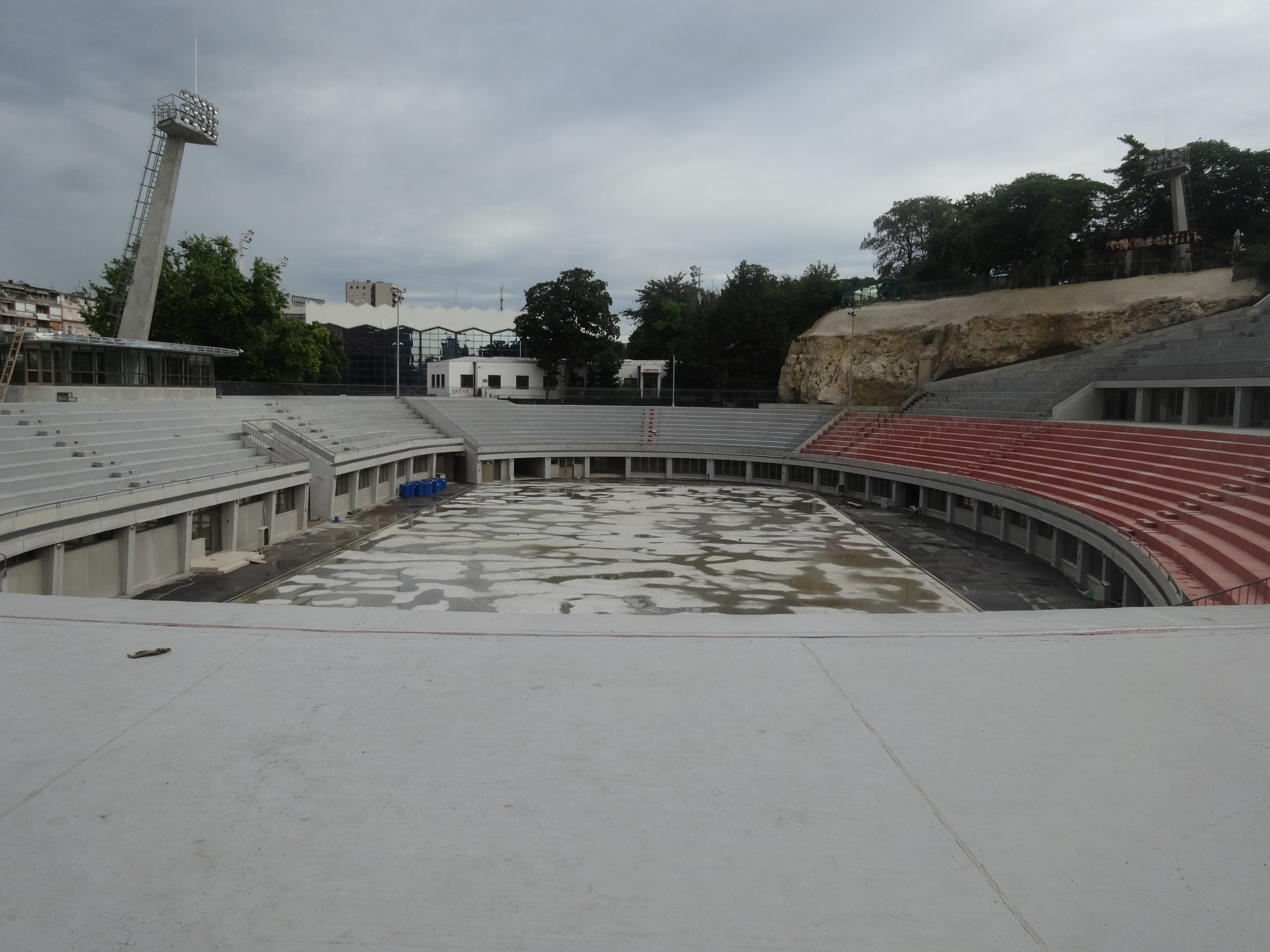 Природни споменик Миоценски спруд Ташмајдан Ово је фотографија заштићеног природног добра у Србији под шифром: СП020 This is a a photo of a natural area in Serbia with ID: СП020